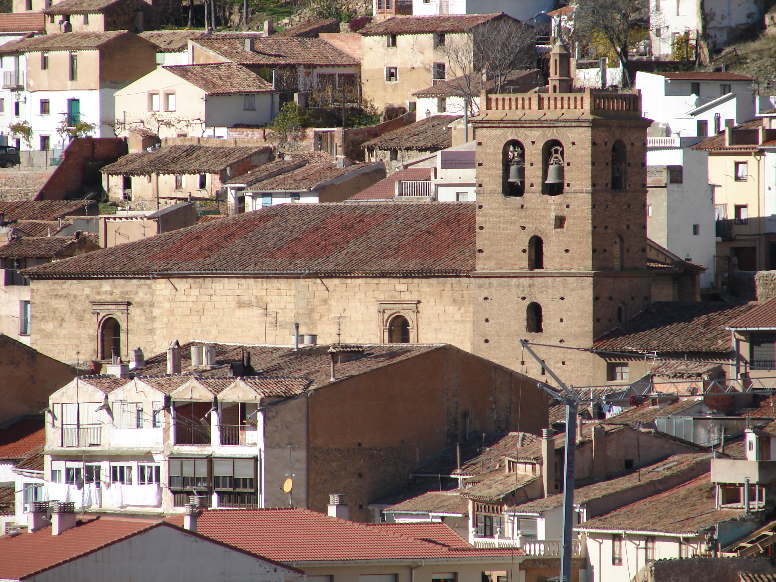 Edificio Religioso, Iglesia de Santa Ana de Cervera del Río Alhama